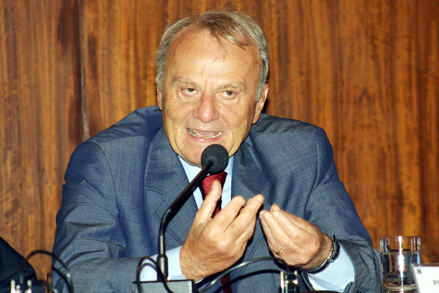 Brasília - Piero Luigi Vigna, da Comissão Superior de Magistratura da Itália, em entrevista coletiva na sede do Banco do Brasil. Bruno Spada/ABr.